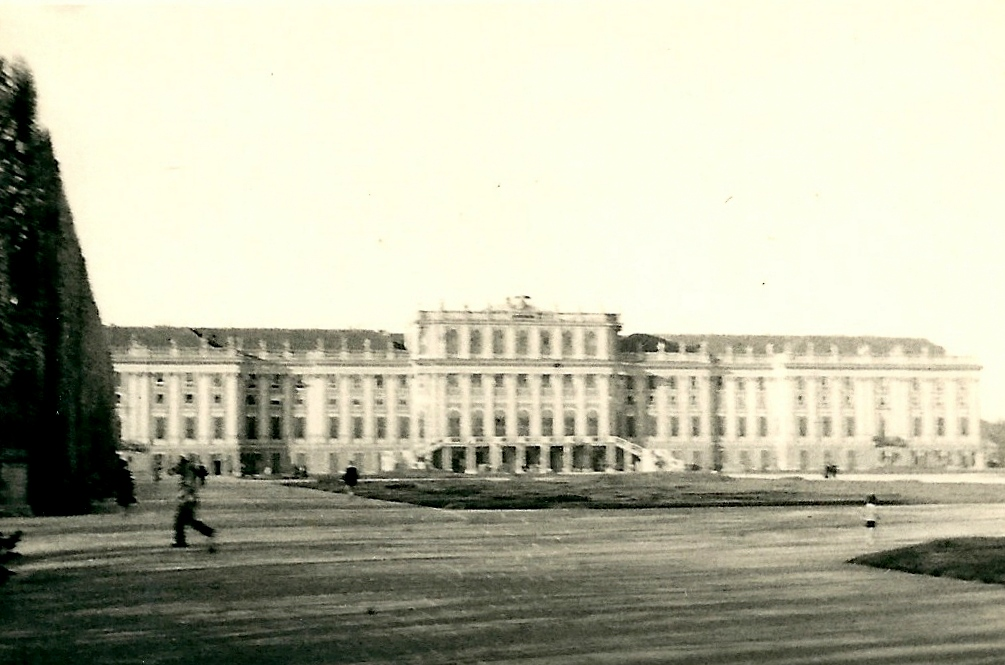 Schloss Schönbrunn